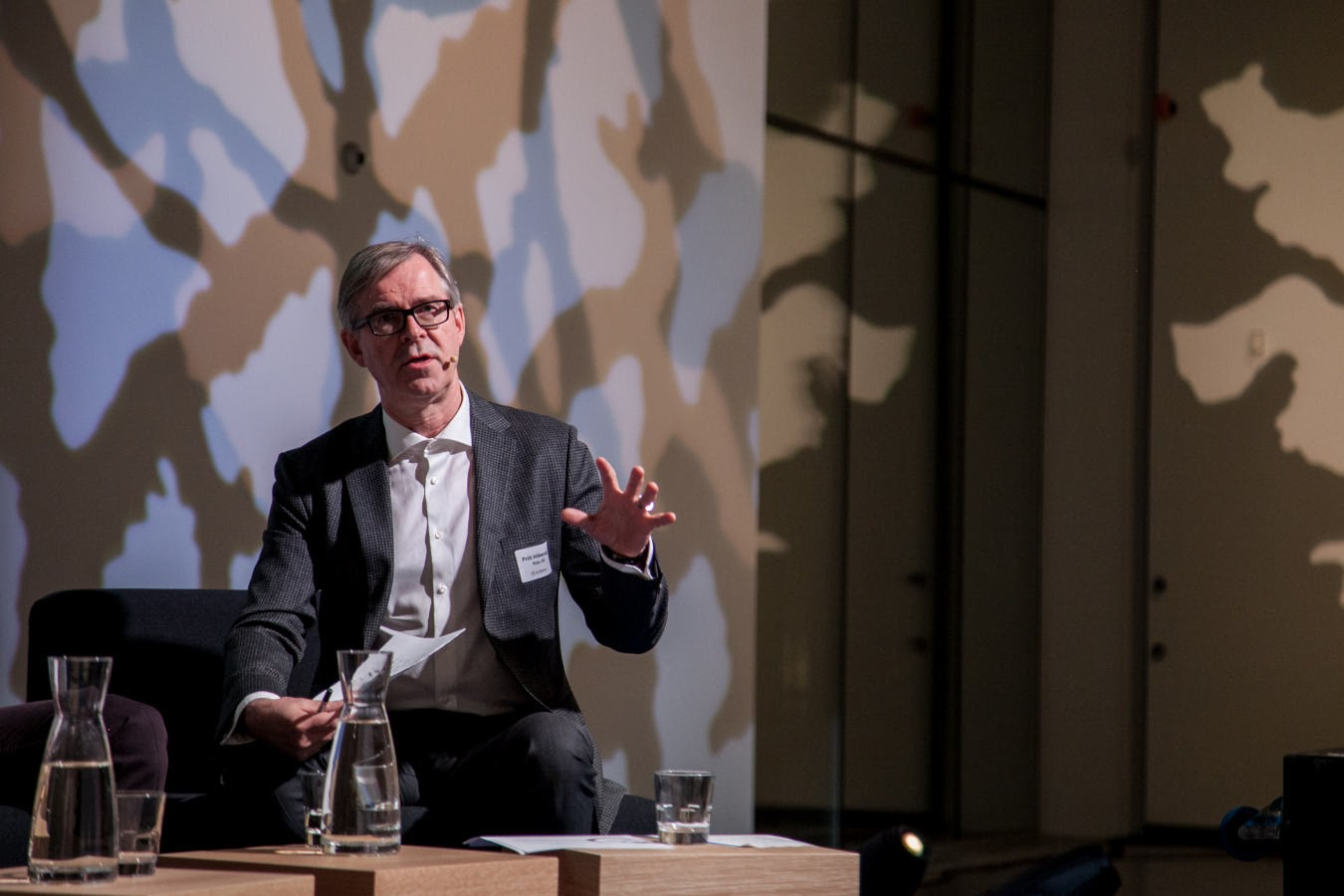 Priit Hõbemägi 2016. aasta teaduskommunikatsiooni konverentsil.